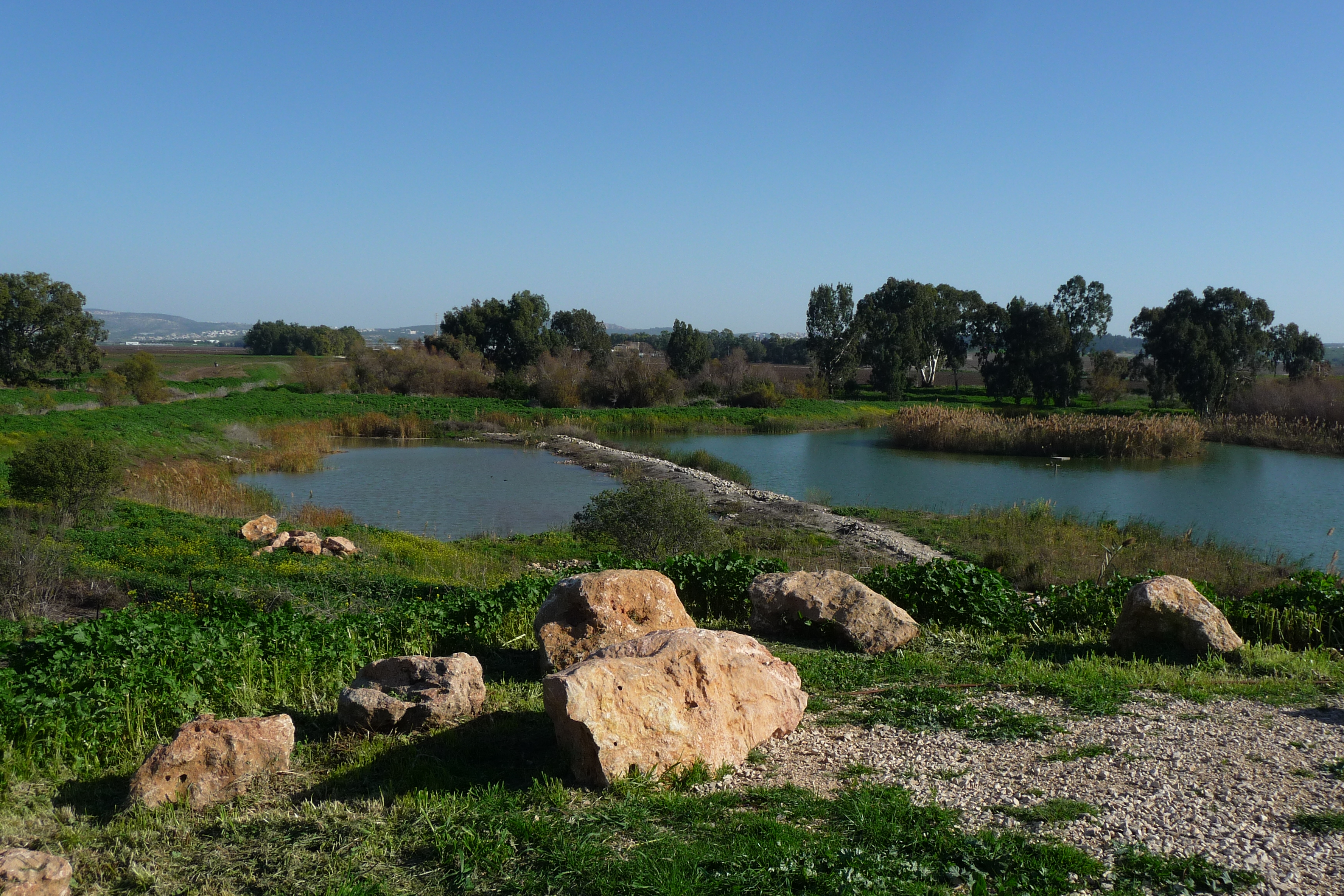 שמורת טבע בעמק זבולון, מזרחית לקריית ביאליק. השמורה כוללת הן את המעיינות והביצות המהווים את מקורו של נחל נעמן והן את האתר הארכאולוגי תל אפק. השמורה הוכרזה ב-1979 והיא משתרעת על פני 660 דונם. ב-1996 הוכרה השמורה כ"אתר רמסר" בהתאם לאמנת רמסר לשימור ולפיתוח בר-קיימא של בתי גידול לחים.